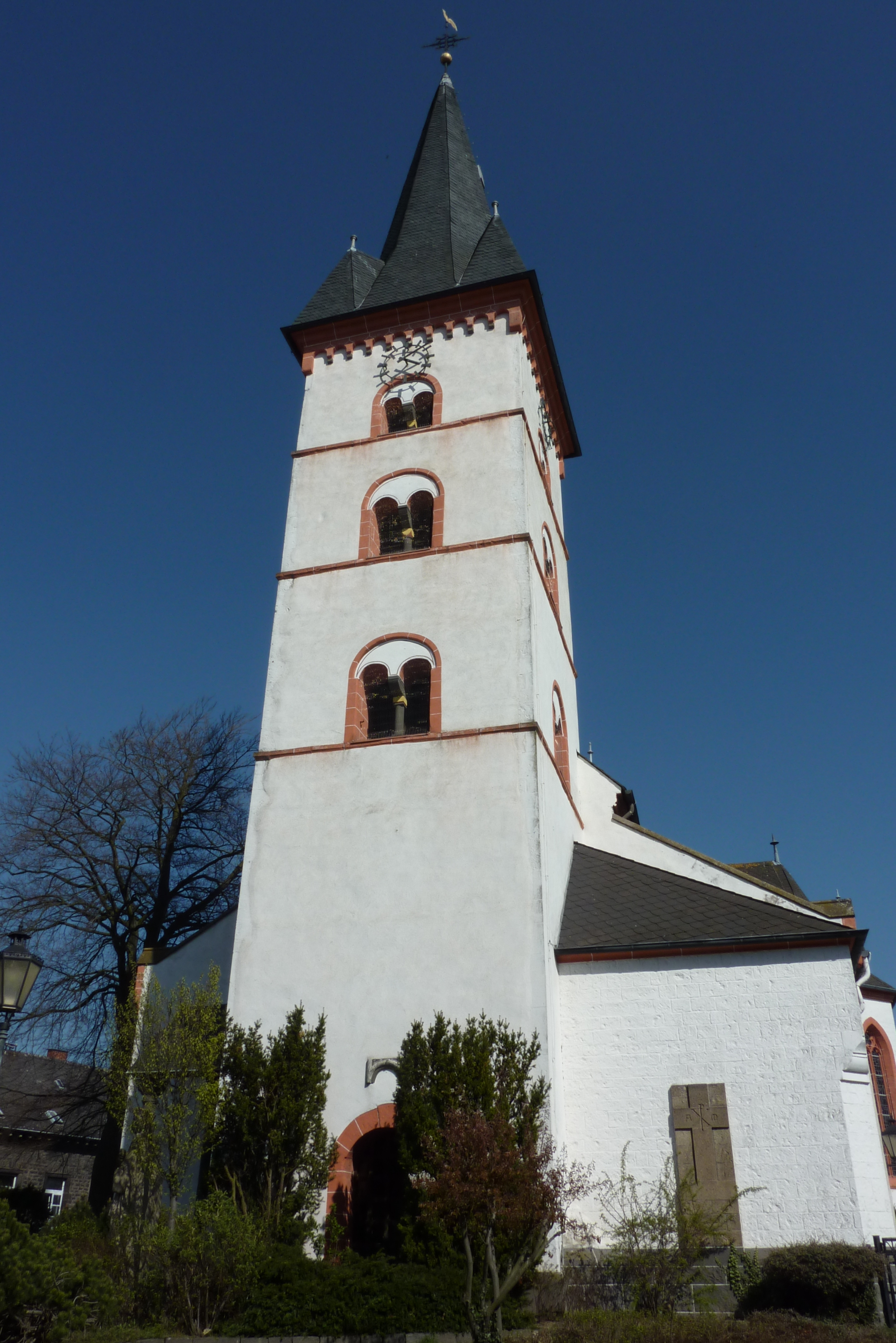 Katholische Pfarrkirche St. Genovefa mit romanischem Turm, im Stadtteil Obermendig von Mendig